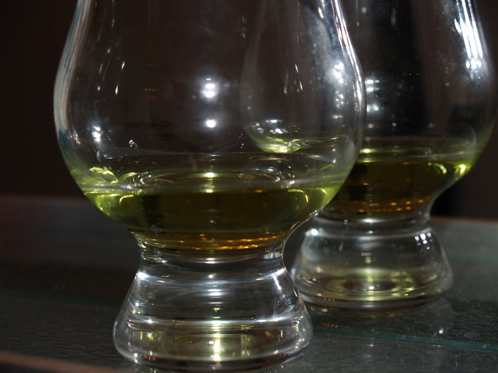 Absinth